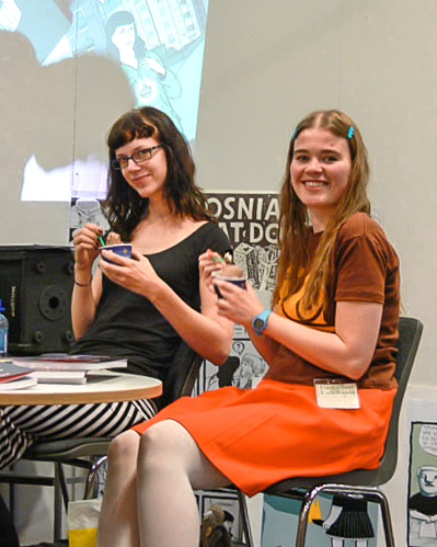 Loka Kanarp och Eva Björkstrand på Bokmässan i Göteborg 2006.